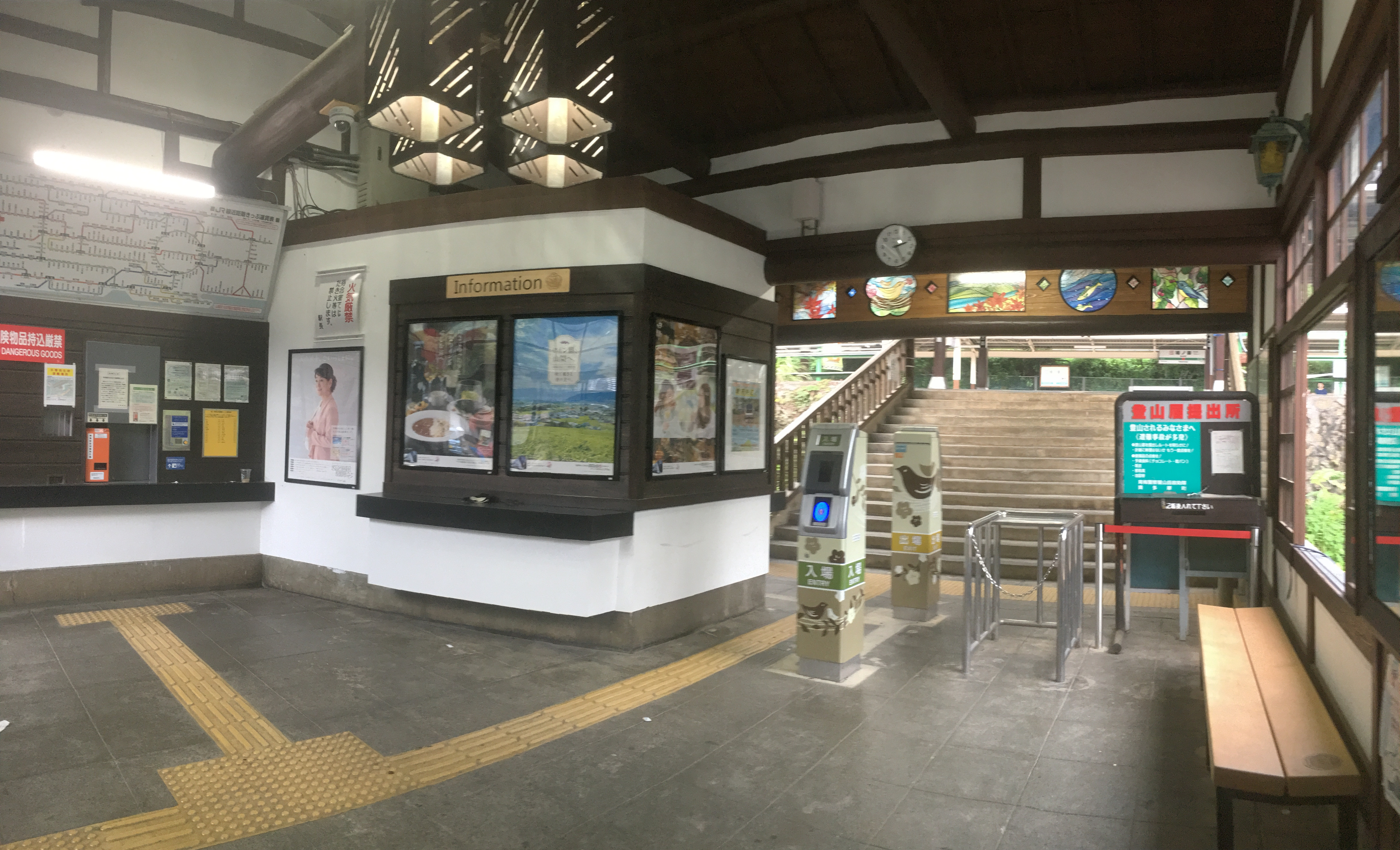 鳩ノ巣駅 (Hatonosu Station)